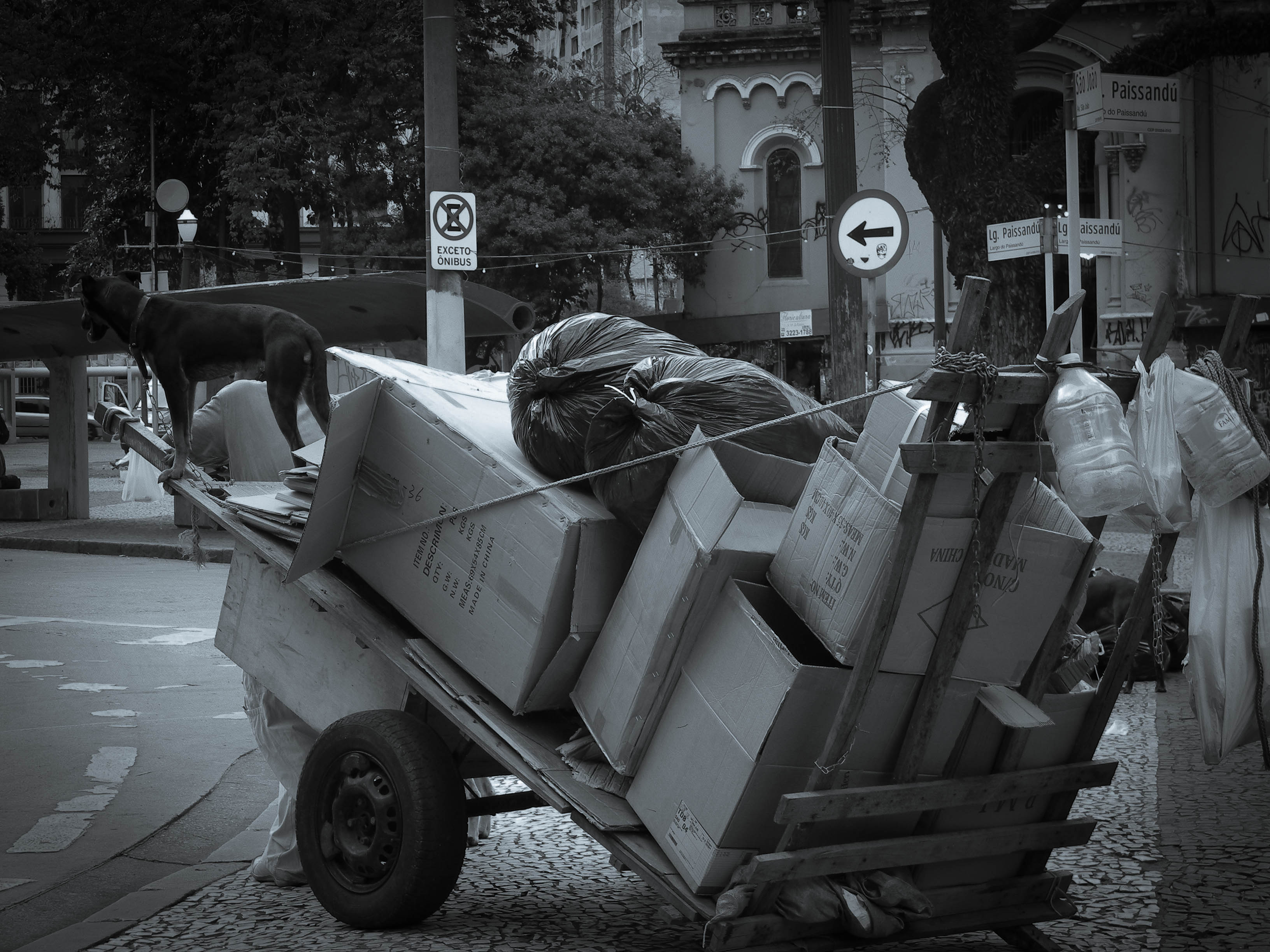 Morador de rua carrega carrinho de papelão em São Paulo